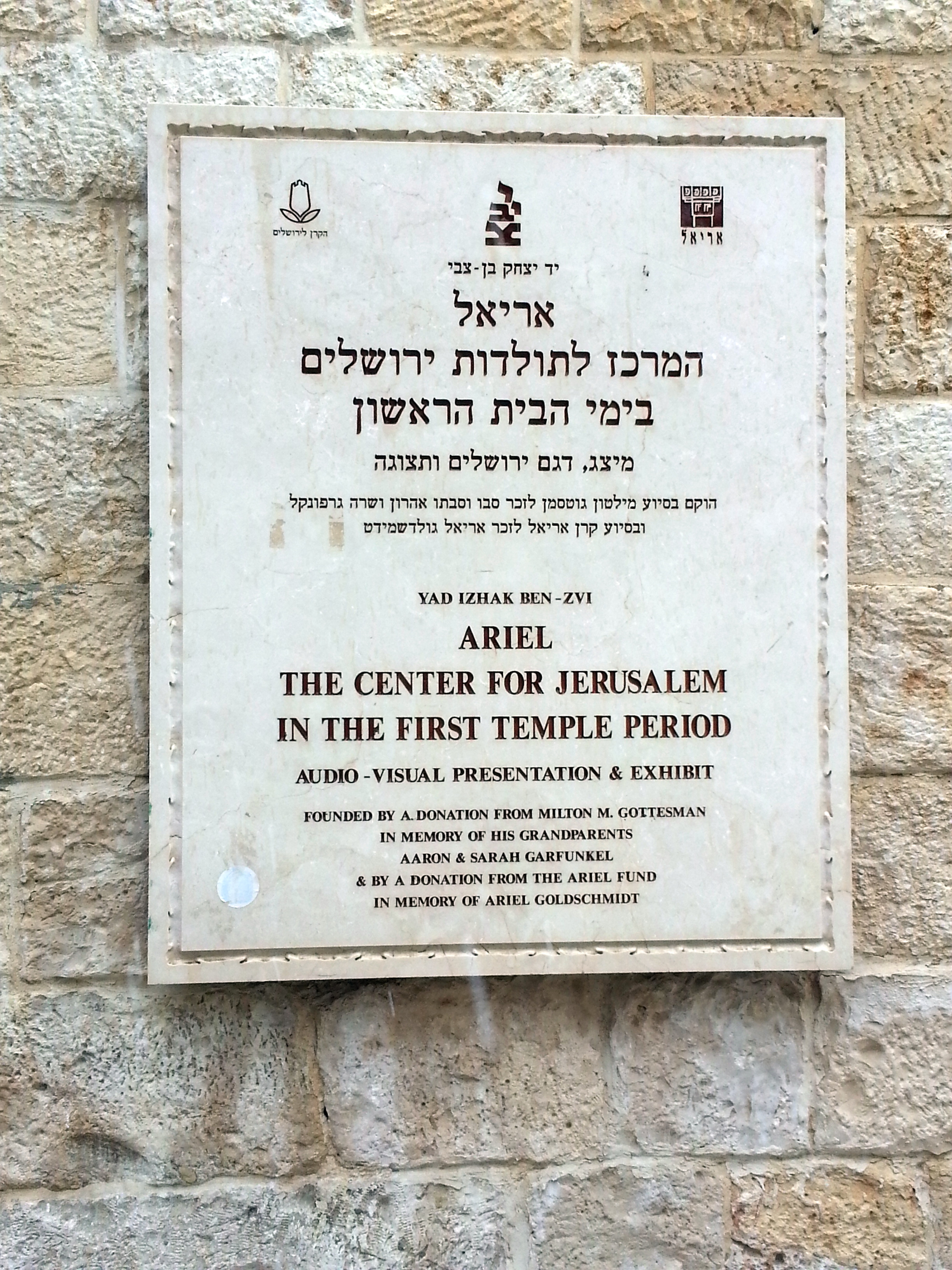 שלט מרכז אריאל ברובע היהודי בעיר העתיקה בירושלים